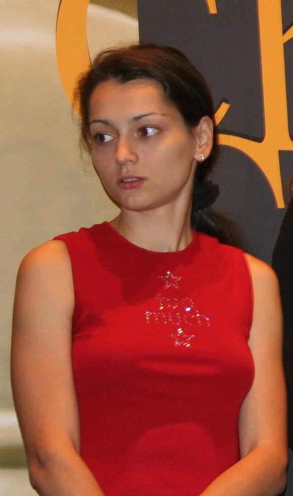 Alexandra Kosteniuk (2005) en: Alexandra Kosteniuk – Russian grandmaster. August 2005. de: Alexandra Kosteniuk - Russische Großmeisterin. August 2005. ru: Александра Костенюк — Российский гроссмейстер. Август 2005.